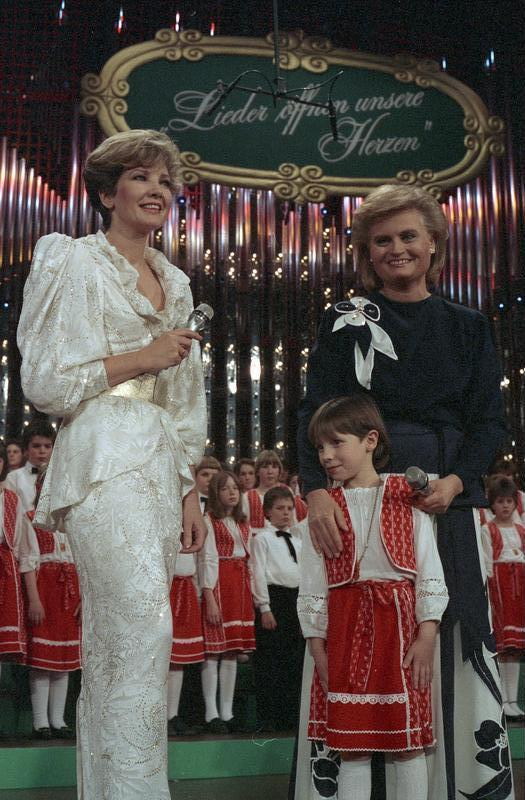 12.12.1986 Hannelore Kohl sagt Danke Weihnachtskonzert "Lieder öffnen unsere Herzen" veranstaltet vom Kuratorium ZNS für Unfallverletzte mit Schäden des Zentralen Nervensystems e.V. in der Alten Oper in Frankfurt. Die Präsidentin des Kuratoriums ZNS, Hannelore Kohl, lud Mitbürger, die sich helfend in den Dienst ihrer Mitmenschen stellen, ein, um ihren Einsatz zu danken. Durch den Abend führte die Fernseh-Moderatorin, Carolin Reiber.